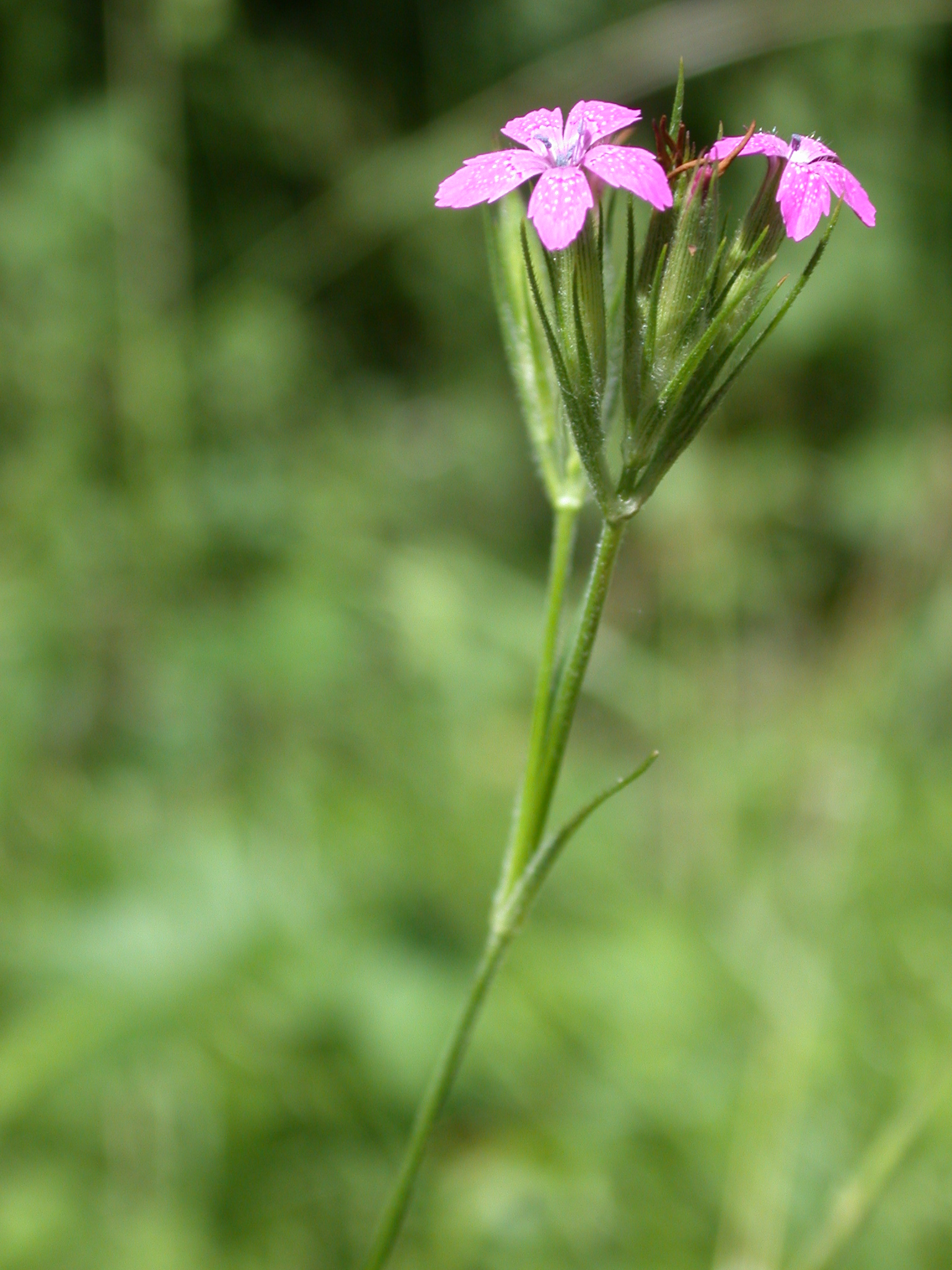 Dianthus armeria Forêt de la Reine (Meurthe-et-Moselle), France